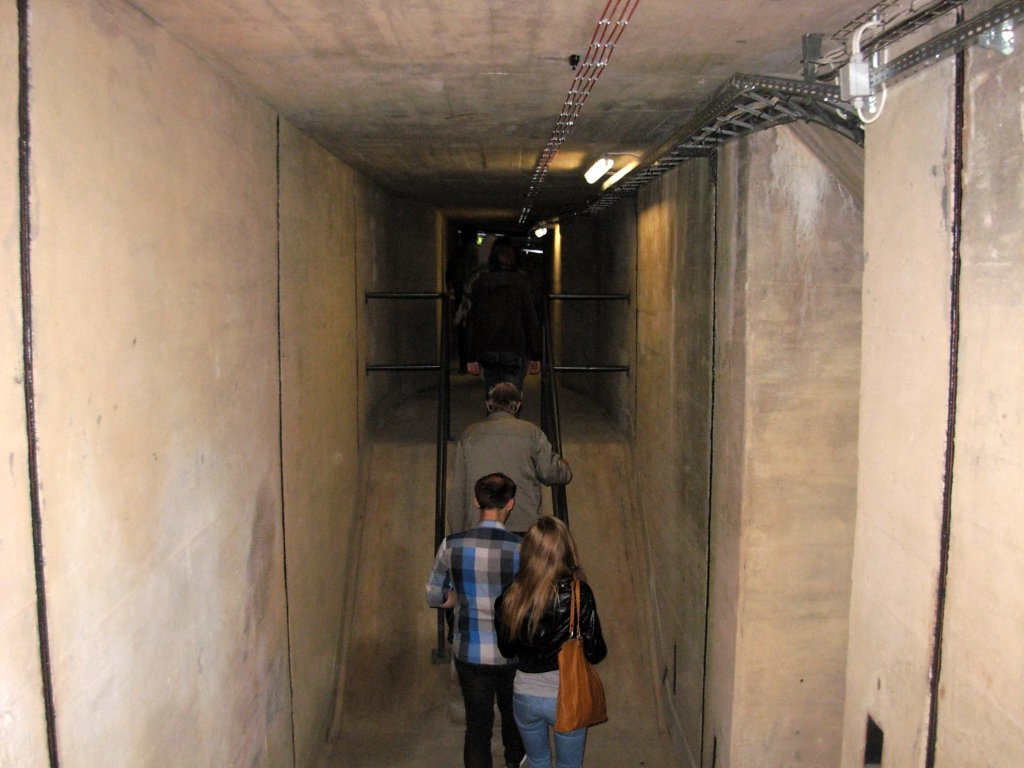 Eksploseum w Bydgoszczy - tunel łączący budynki